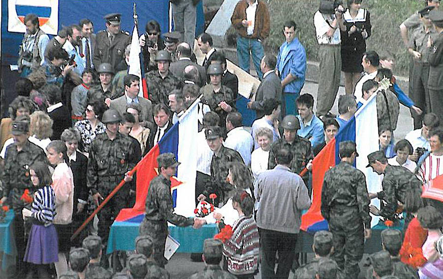 Prisega slovenskih vojakov v Učnem centru Ig, 2. junij 1991